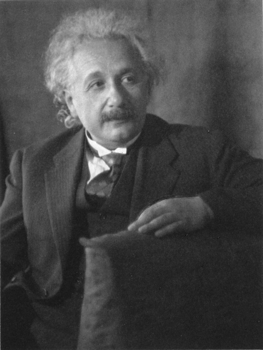 Albert Einstein, half-length portrait, seated, facing right Inscribed on mat: Mrs. Eugenie Meyer zum Andenken an ihren Besuch in Caput [i.e. Caputh] am 15.VIII.31. Albert Einstein.